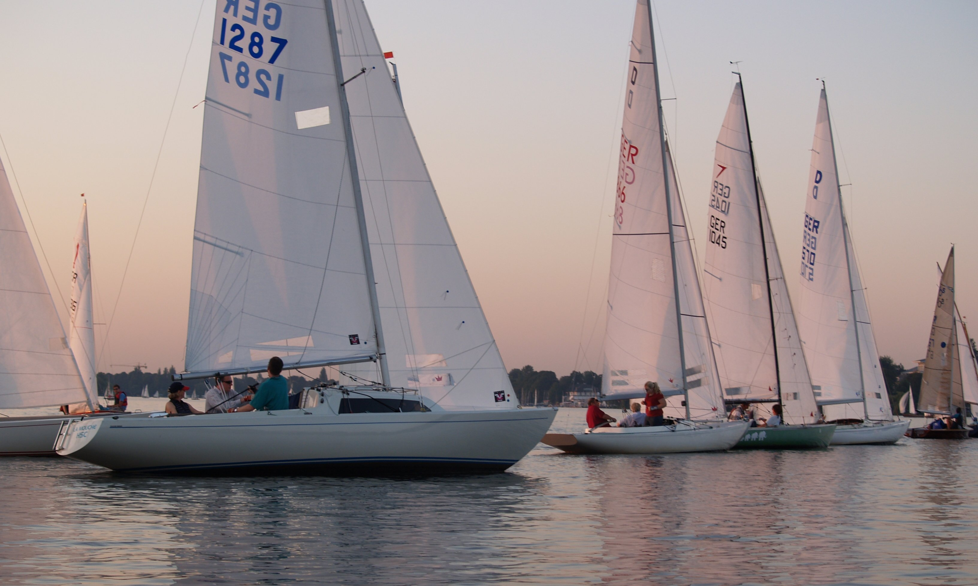 v.l. H-Boot, Drachen, Dyas und noch ein Drachen, und ein 505er